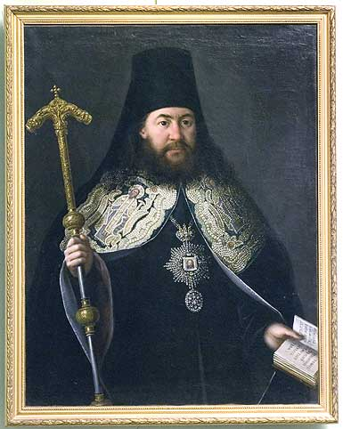 С лаврской коллекцией связана и одна из самых ранних работ ученика А. П. Антропова Петра Дрожжина, начавшего свой творческий путь, видимо, в Троице-Сергиевой лавре, где он учился у лаврского живописца П. Казановича. Портрет архимандрита Лаврентия Хоцятовского (Ил. 10)написан в 1765 году, когда Дрождин был учеником Антропова.